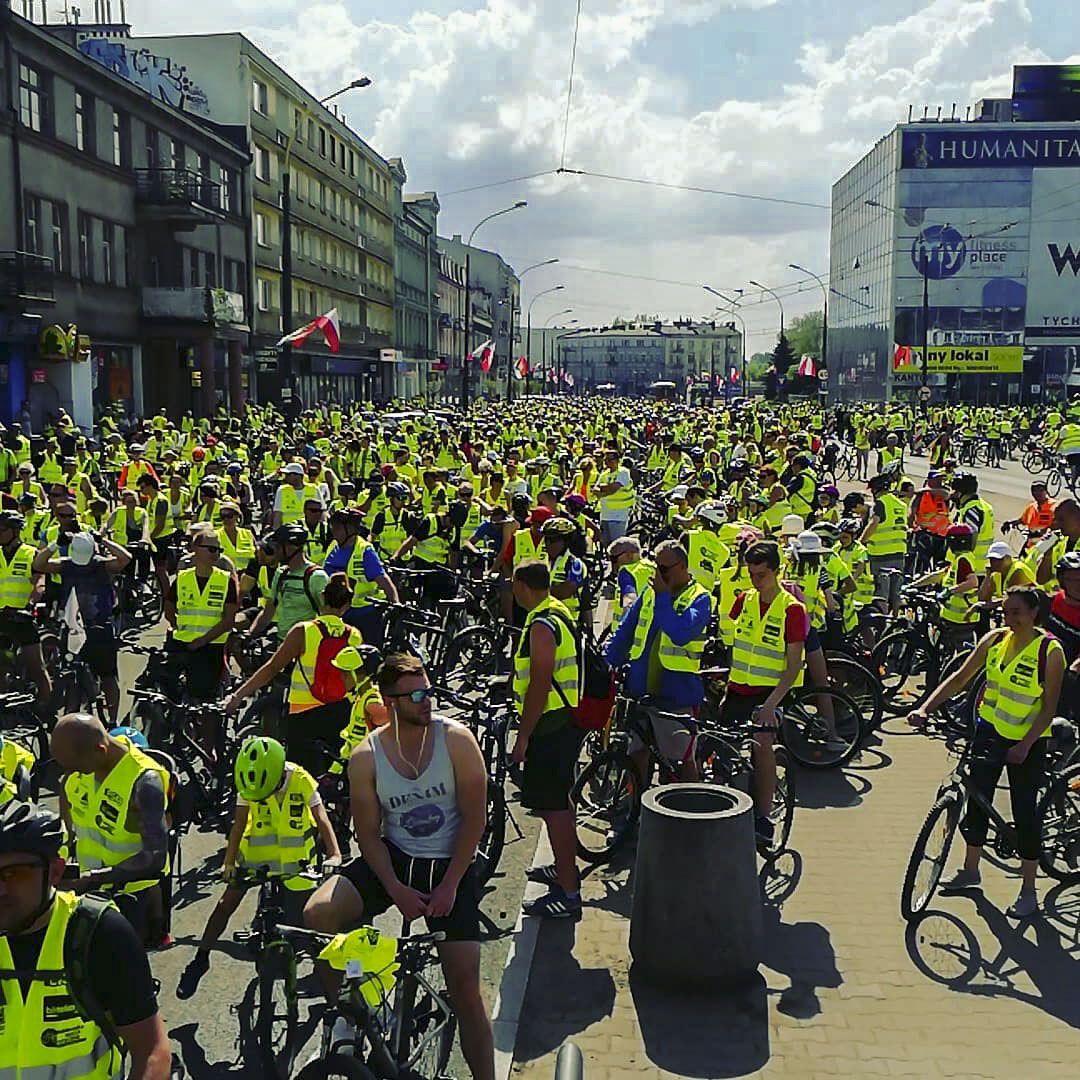 Widok uczestników Zagłębiowskiej Masy Krytycznej tuż przed startem w Sosnowcu